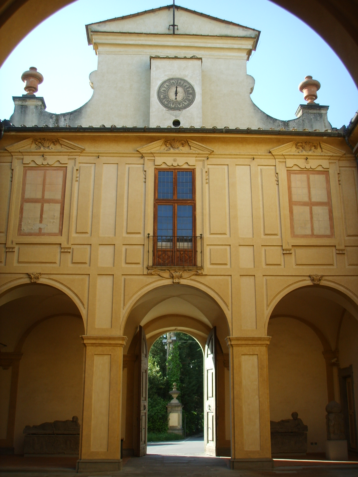 Villa Corsini, cortile